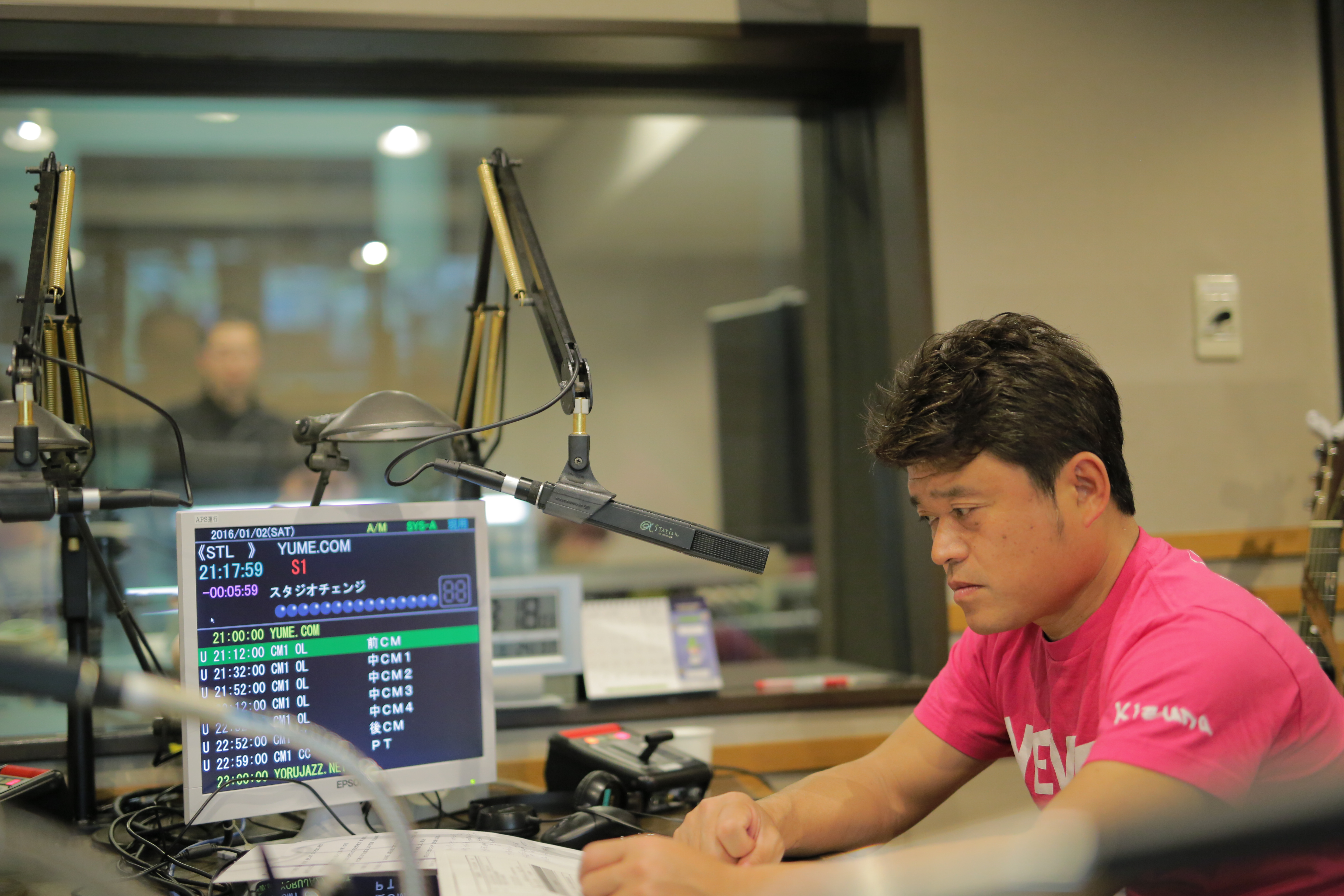 佐々木清次 エフエム京都αステーション 毎週土曜日21時 - 23時「 」